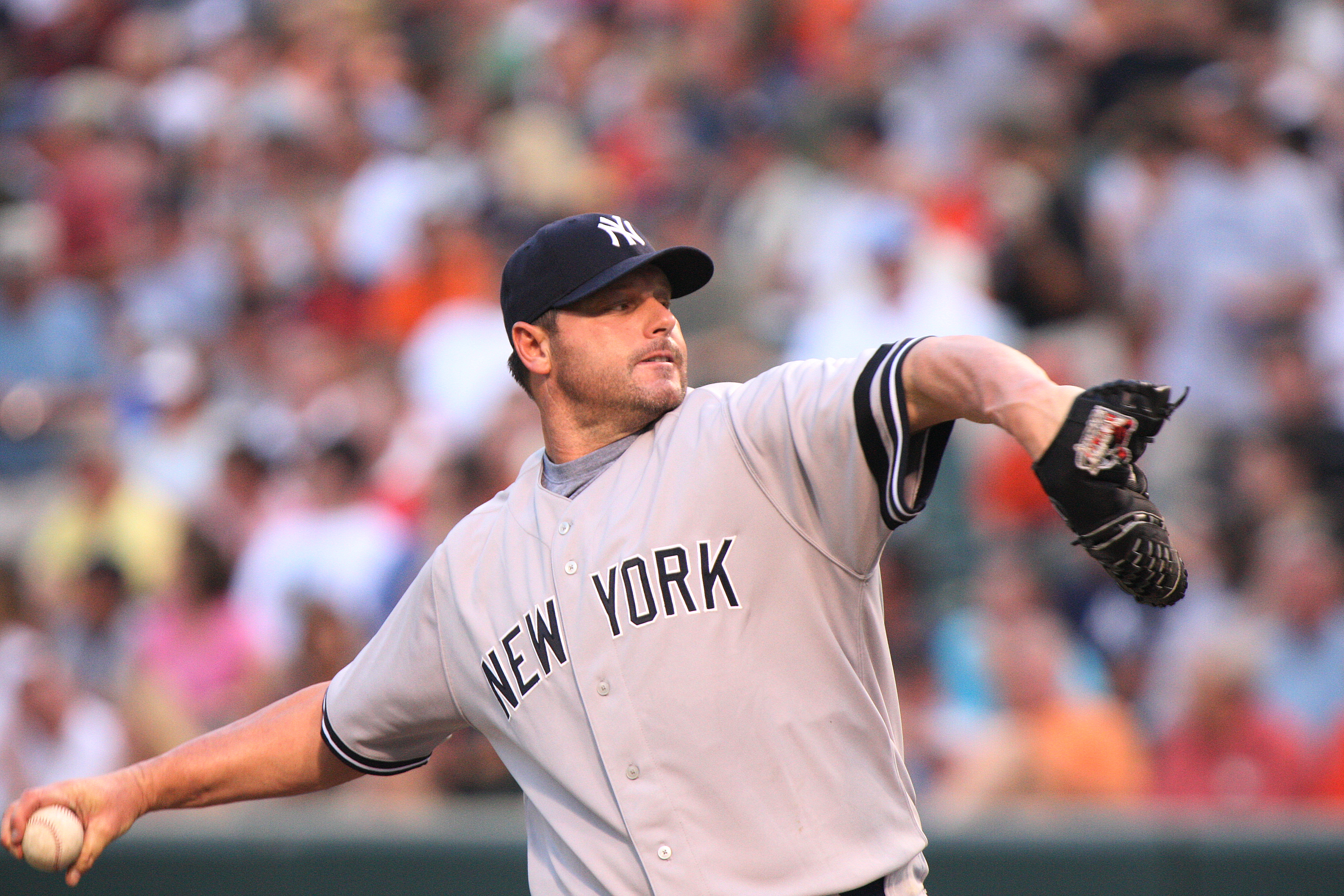 Roger Clemens